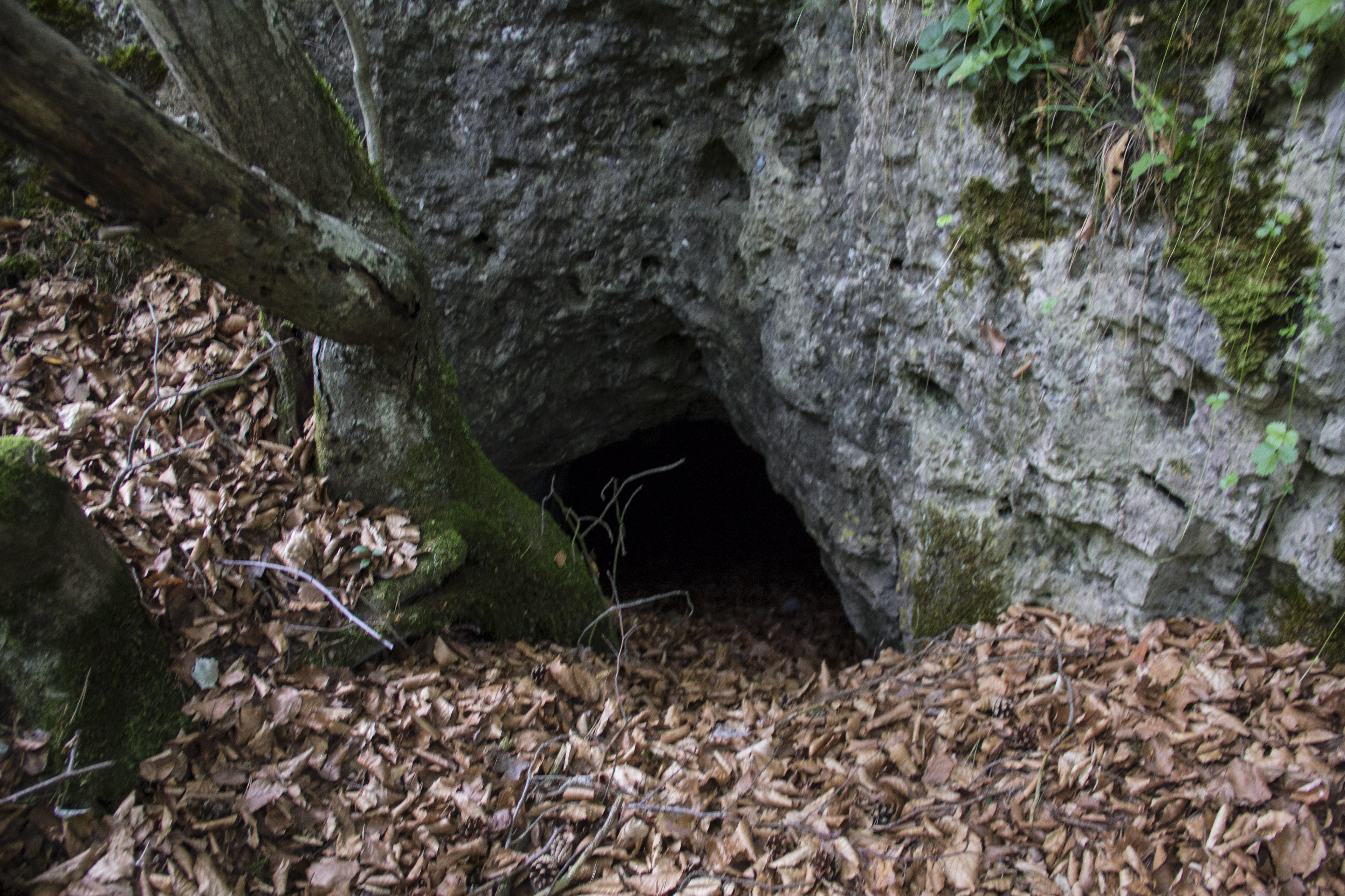 Karsthöhle, Kleines Rohenloch, Velden, Naturpark Fränkische Schweiz-Veldensteiner Forst